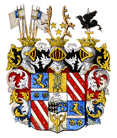 Rehnskiöld nr 48 - Grevliga ätten Rehnskiöld nr 48